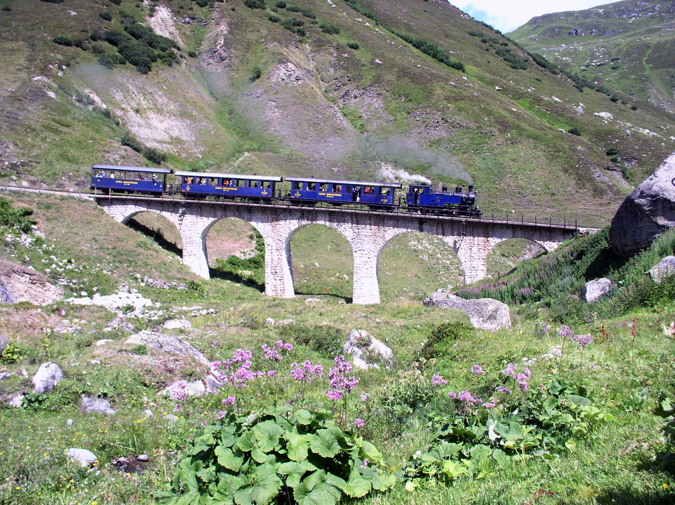 Dampfbahn Furka-Bergstrecke, Steinstafelbrücke